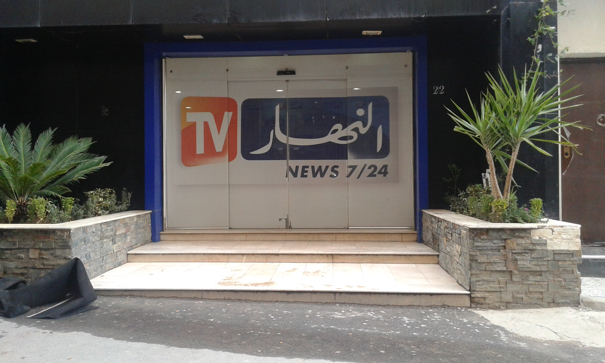 L'entrée du siège d'Ennahar TV à Said Hamdine